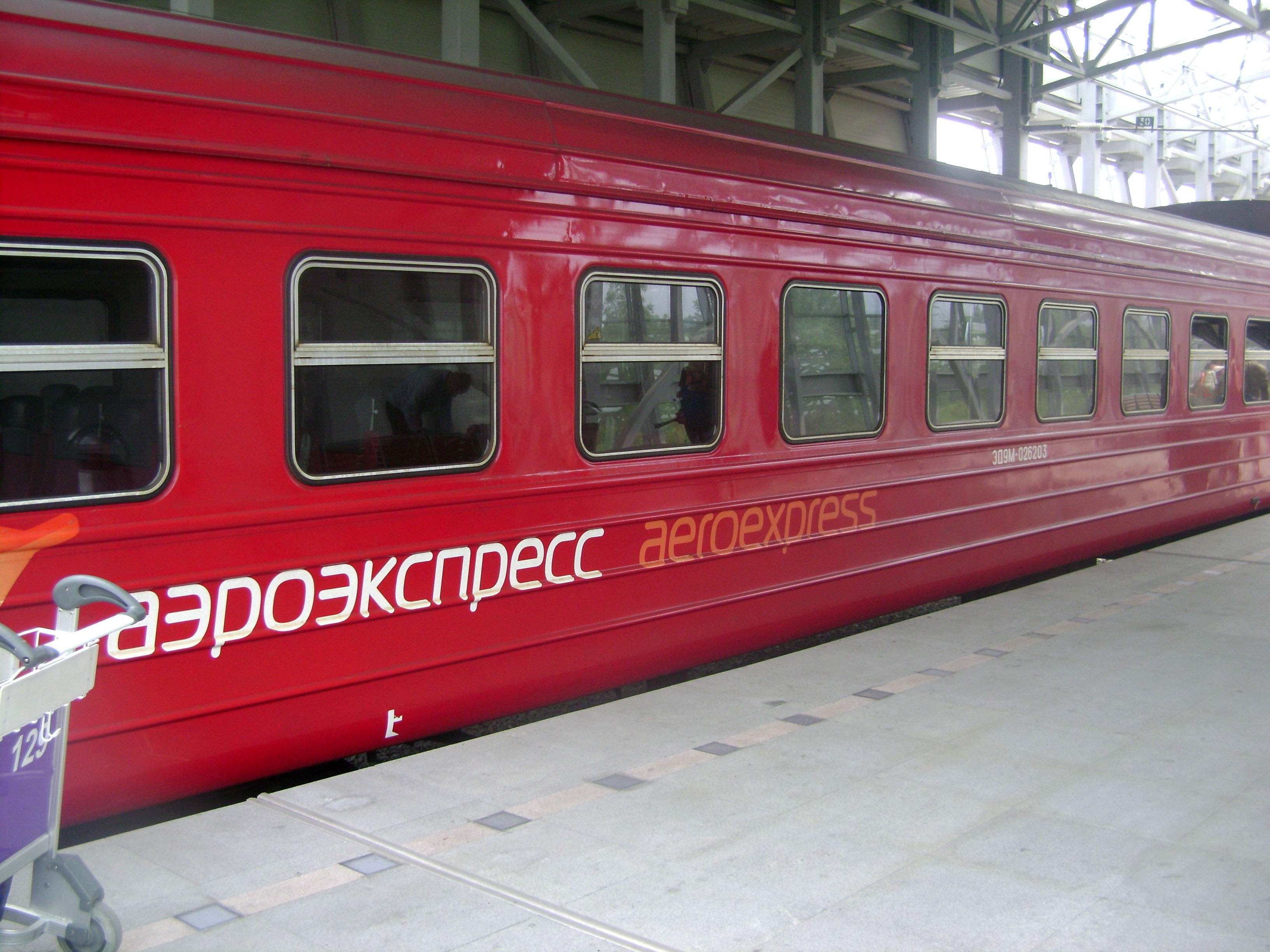 Аэропорт Кневичи (Владивосток). Аэроэкспресс у перрона, 2013-07-09